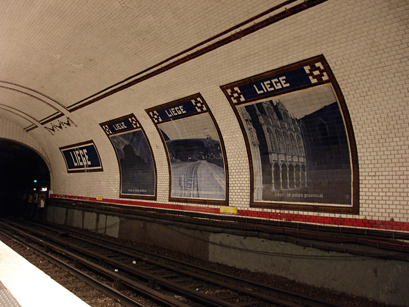 Station Liège, de la ligne 13 du métro de Paris, France.